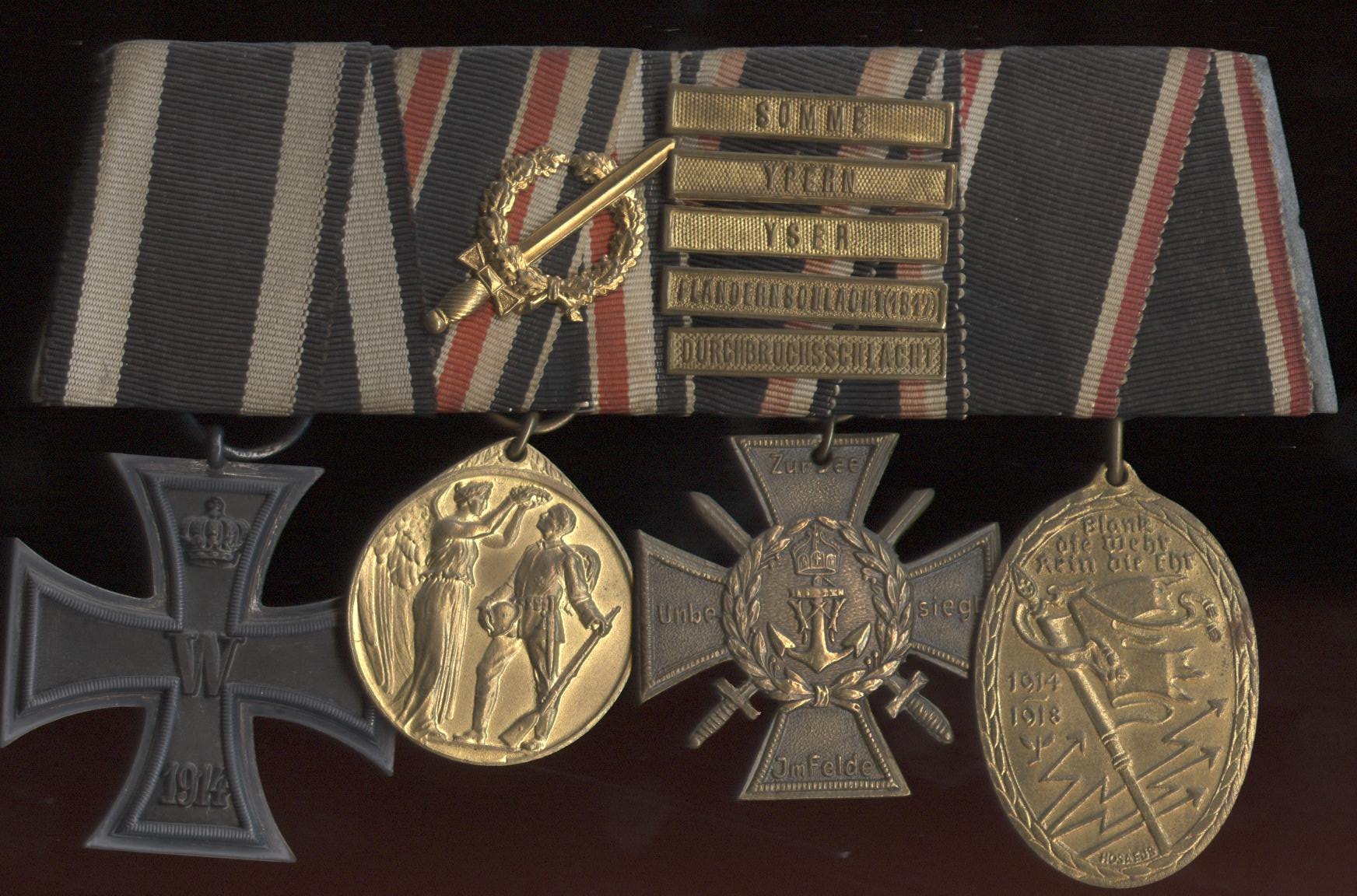 Flandernkreuz oder „Ehren- und Erinnerungskreuz des Marinekorps Flandern“ deutsche Weltkriegsgedenkauszeichnung der Weimarer Republik (13.September 1921) hier: Große Ordenspange, montiet v. l. n. r.: Eisernes Kreuz (1914) II. Klasse Ehrendenkmünze des Weltkrieges mit Kampfabzeichen Flandernkreuz mit fünf Gefechtsspangen Kyffhäuser-Kriegsdenkmünze.